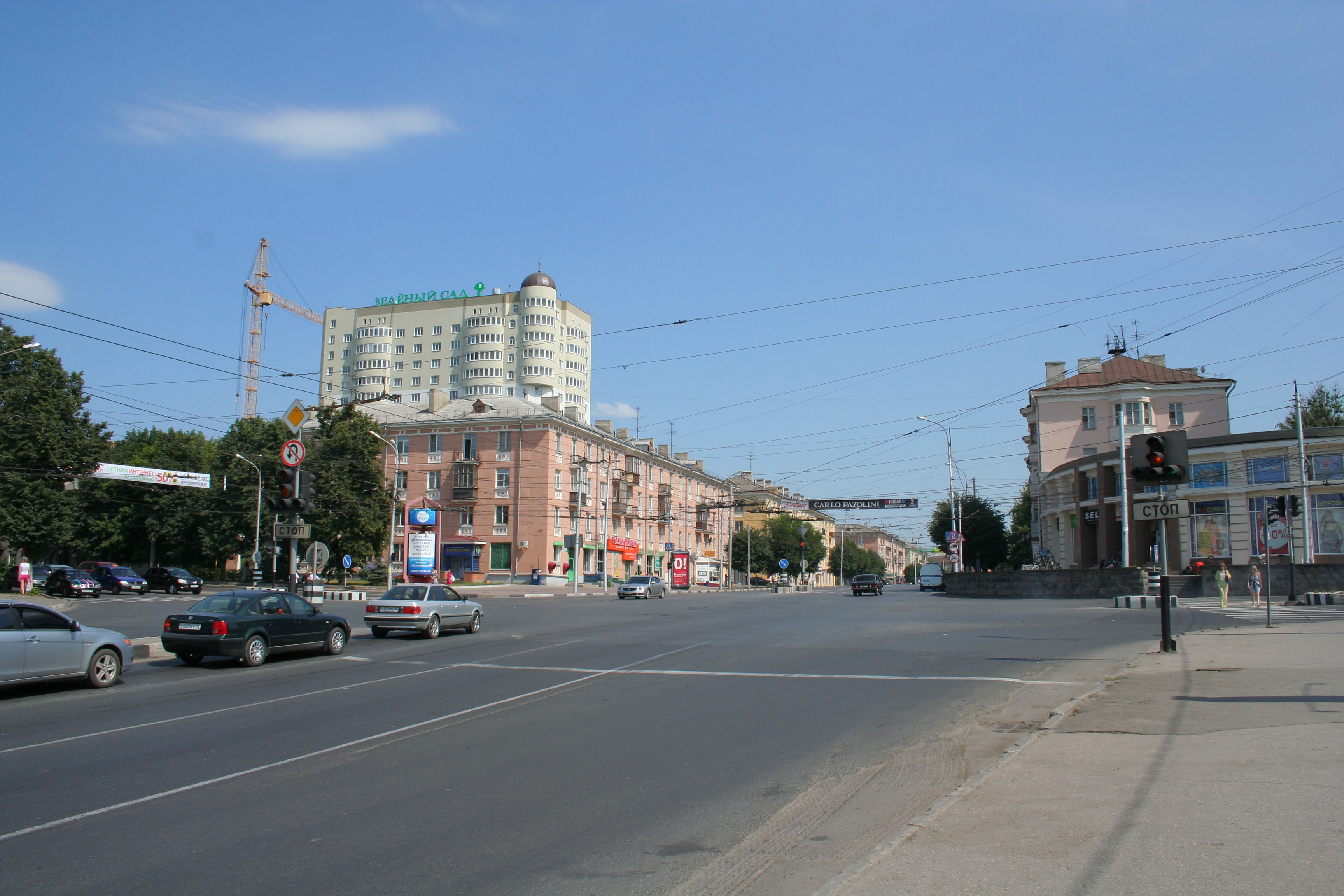 Stadt Rjasan (Russland). Stadtansichten. Historische und moderne Architektur.